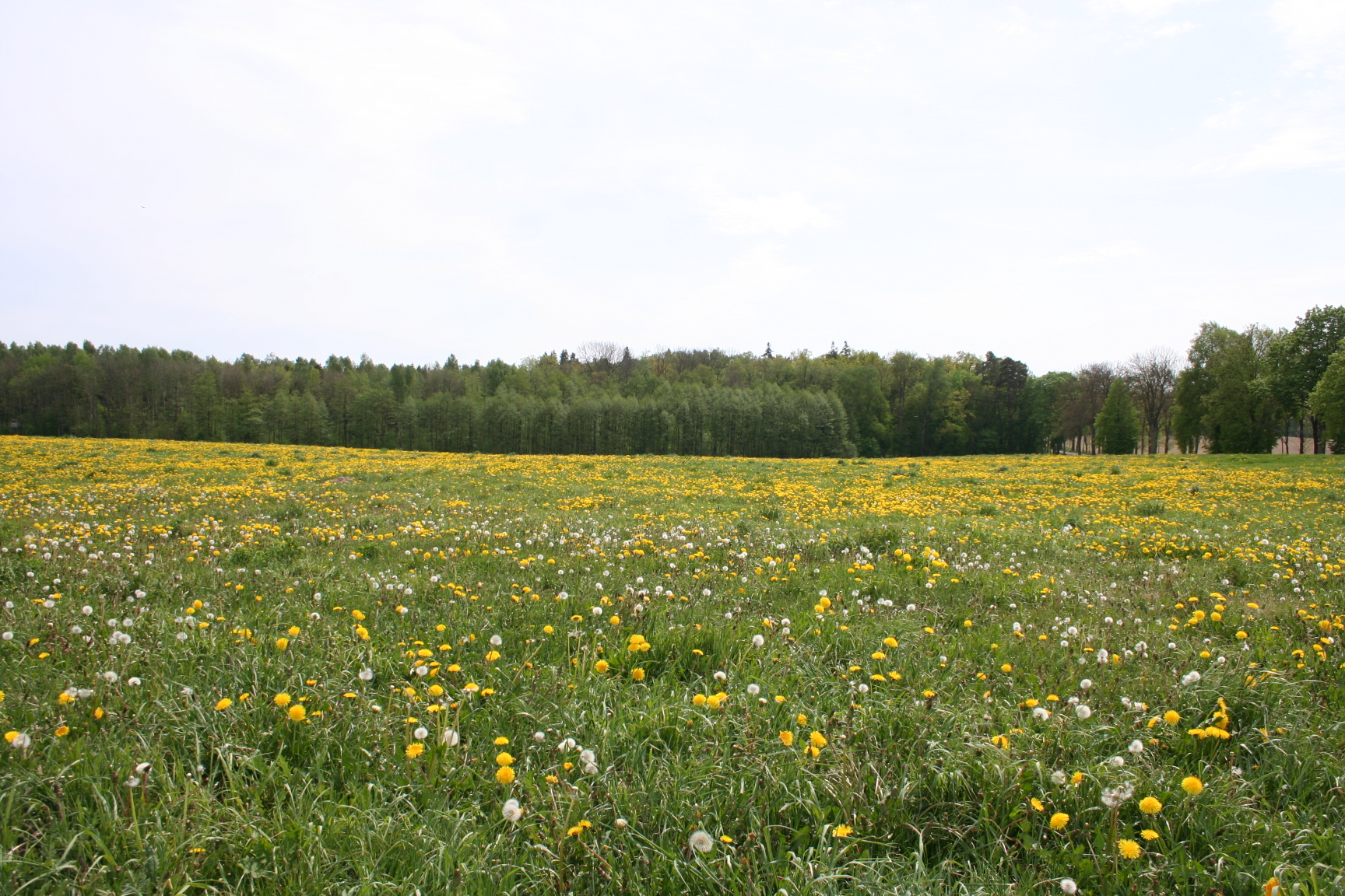 widok na łąkę i las, Wandajny gm. Korsze